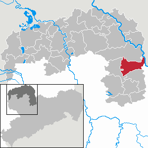 Cavertitz in Saxony - Landkreis Nordsachsen